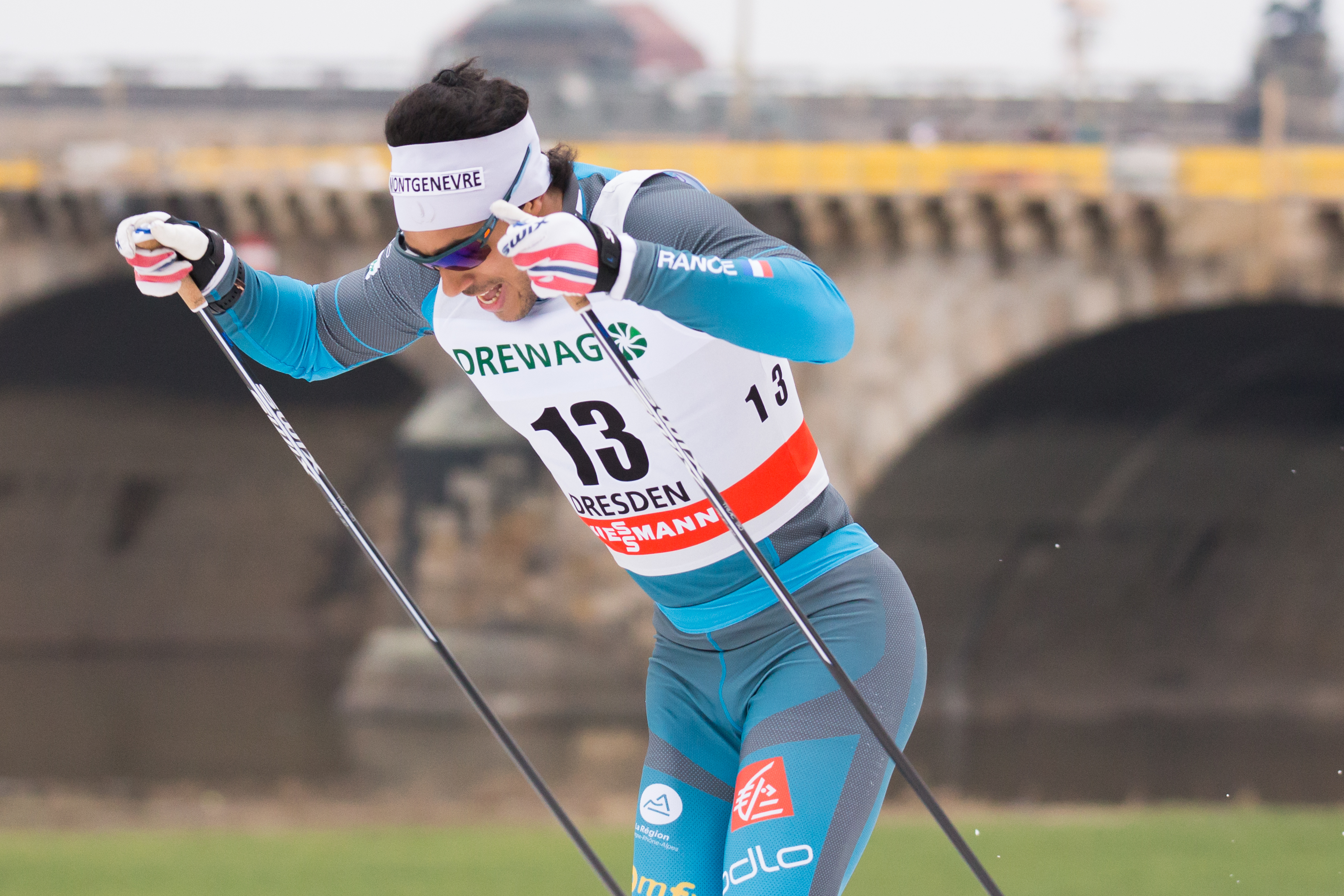 Richard Jouve (FRA, Frankreich)